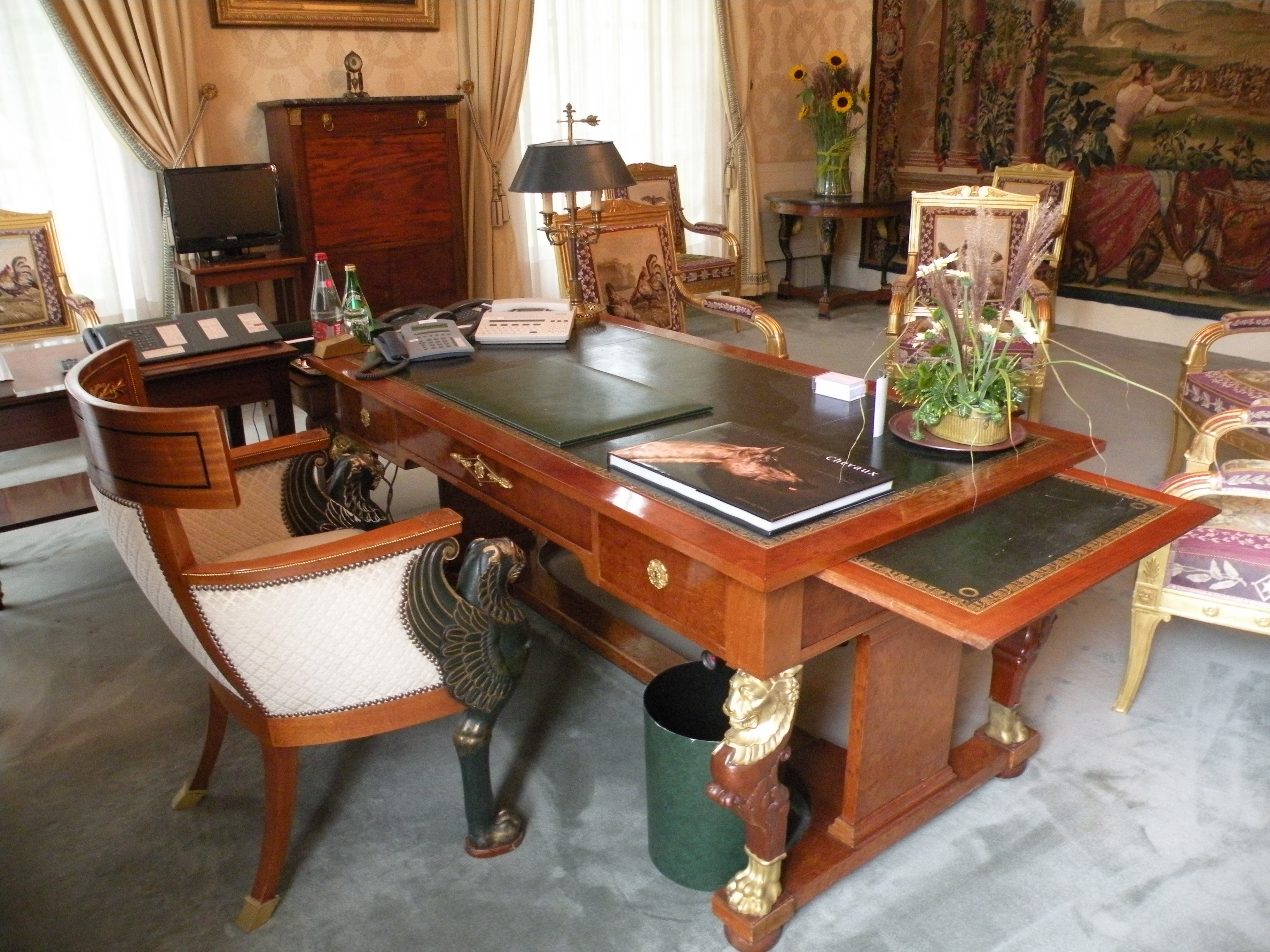 bureau du president du senat